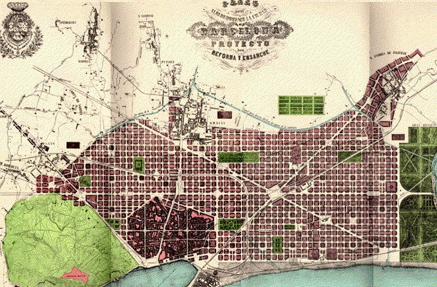 Plano de Barcelona